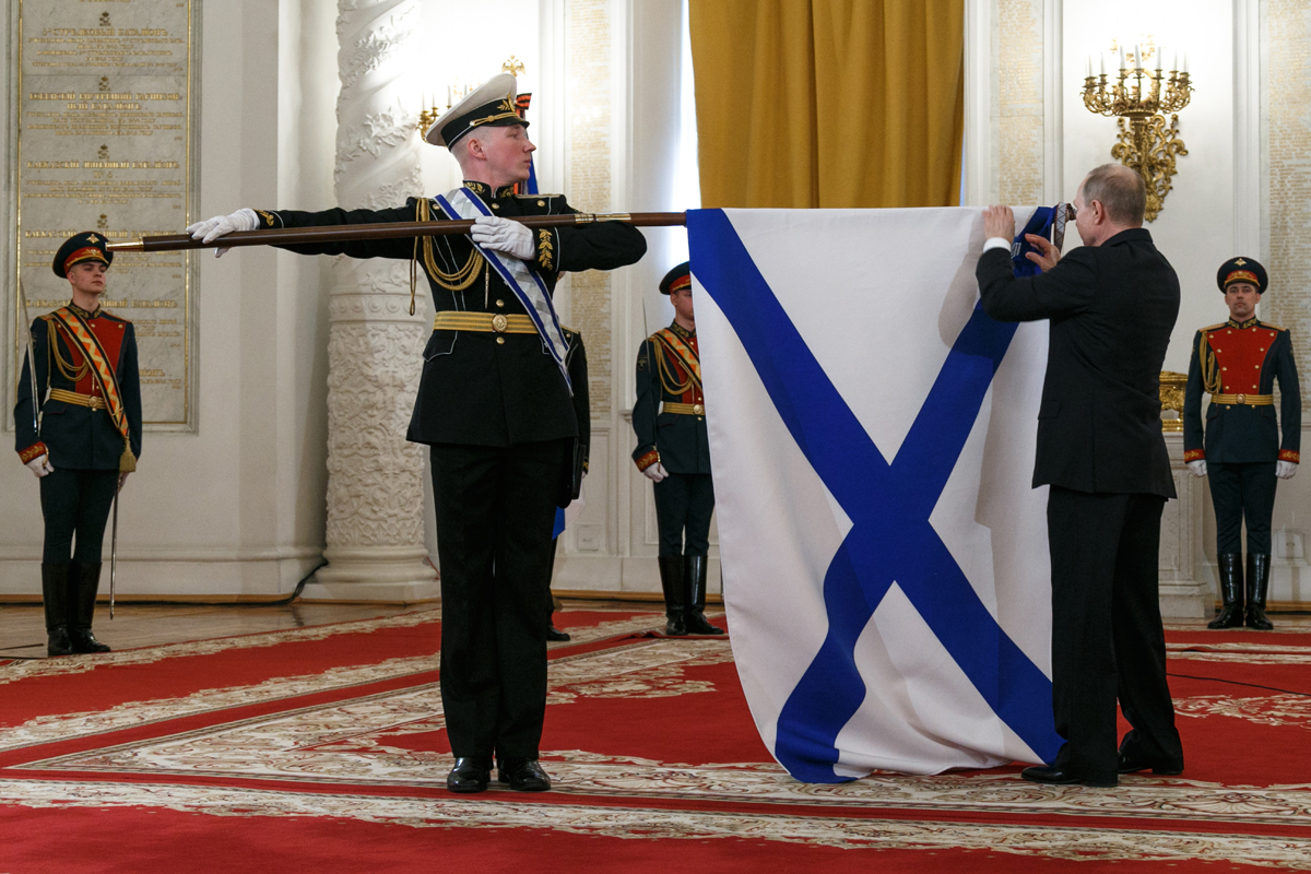 На церемонии вручения государственных наград Российской Федерации, приуроченной к празднованию Дня защитника Отечества. Президент России Владимир Путин прикрепляет орден Ушакова на флаг тяжёлого авианесущего крейсера «Адмирал флота Советского Союза Кузнецов»